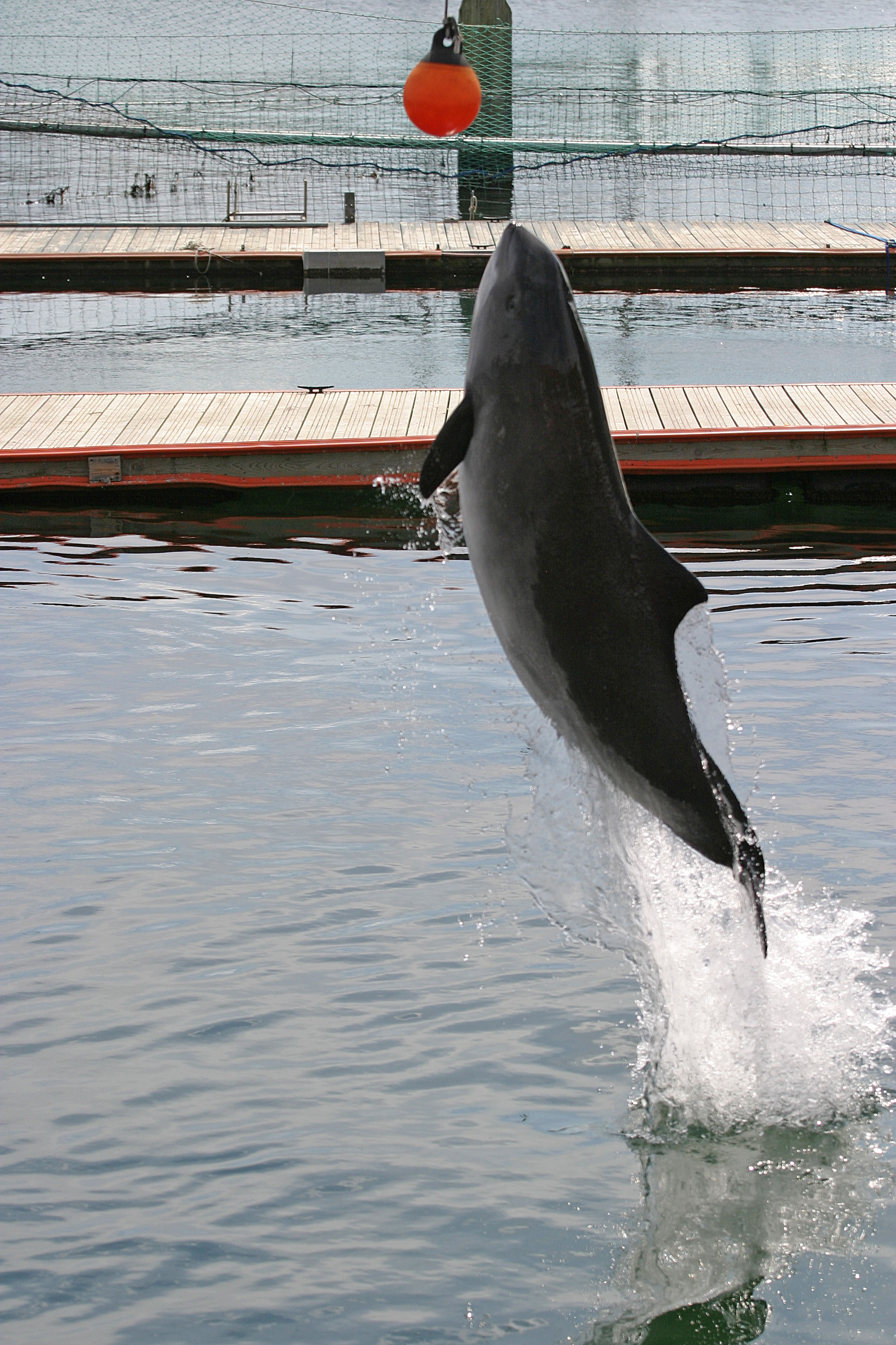 Havne Marsvin (?) springer op af vandet i Fjord & Bælt centret, Kerteminde.